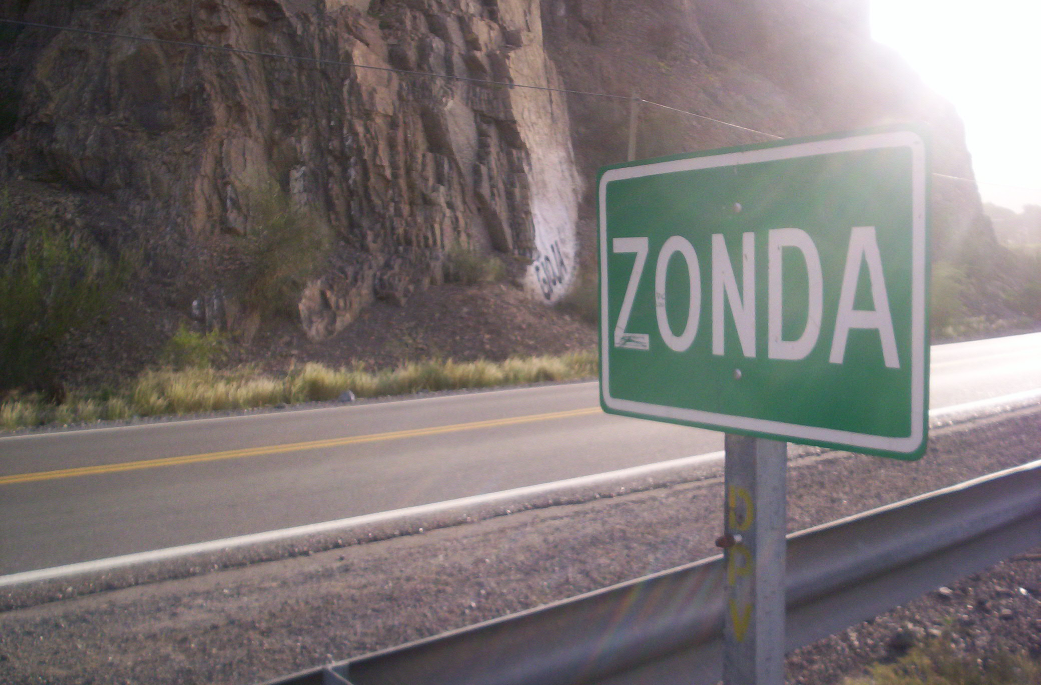 Vista del cartel que dicta el ingreso al departamento Zonda, por la Ruta Provincial 12, Provincia de San Juan, Argentina